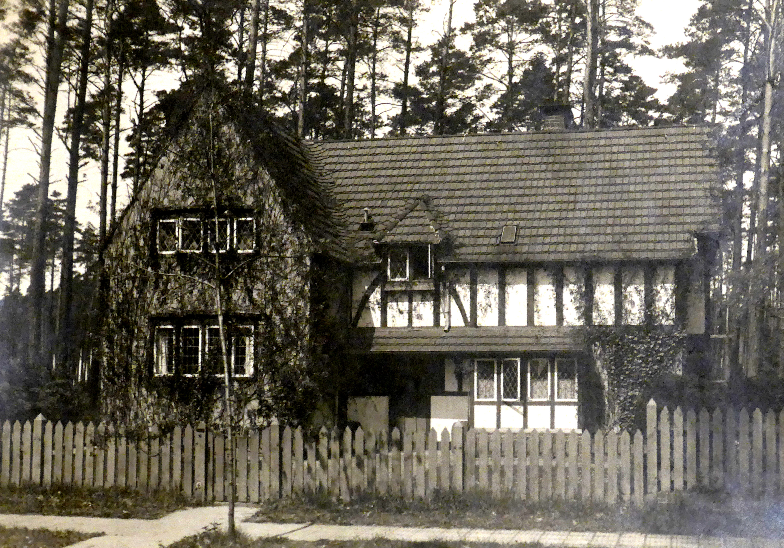 Bau des Architekten Walter Schulze, Bauzeit 1912-1913. Foto vopn ca. 1917